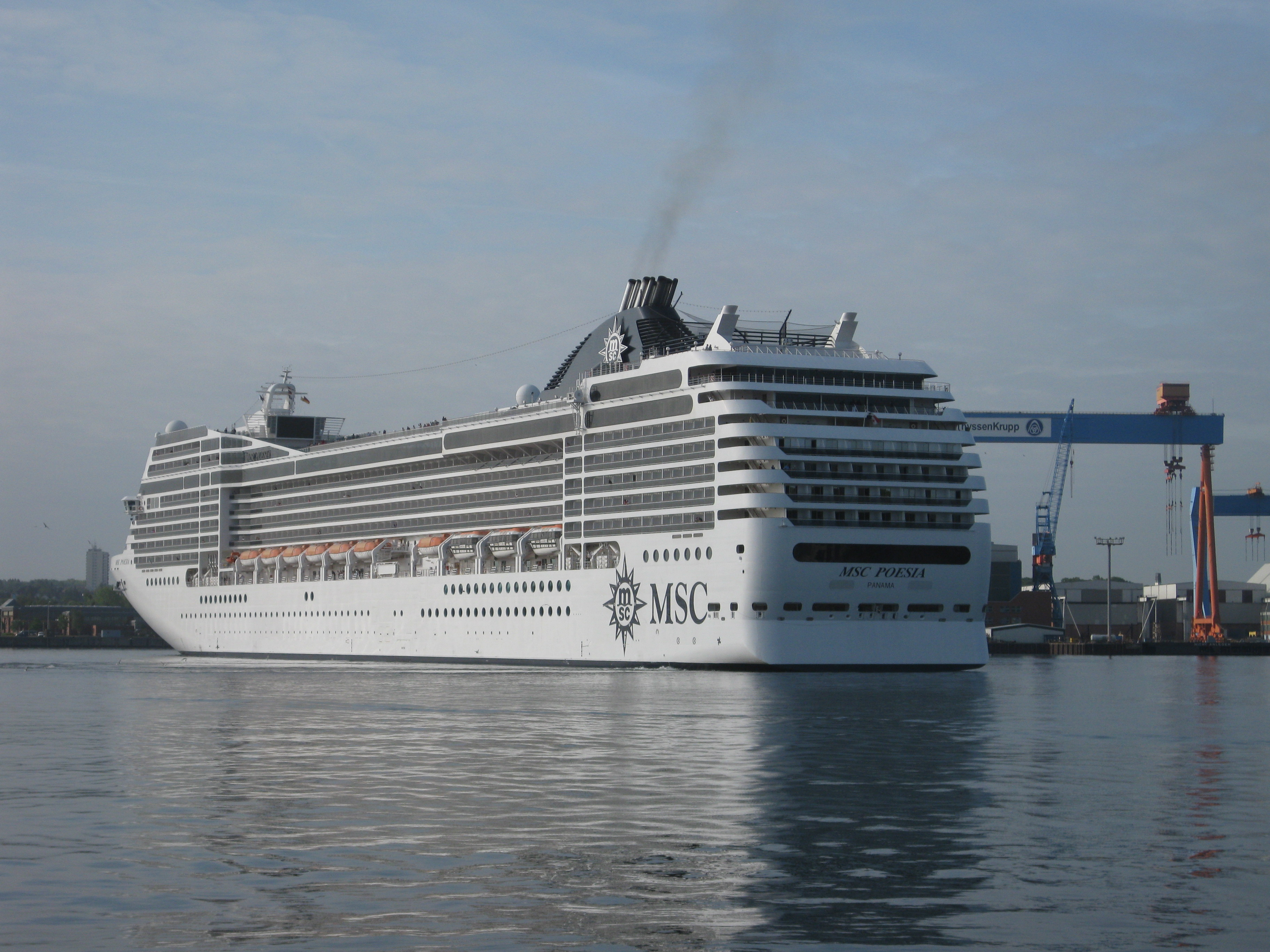 MSC Poesia wendet in der Kieler Förde